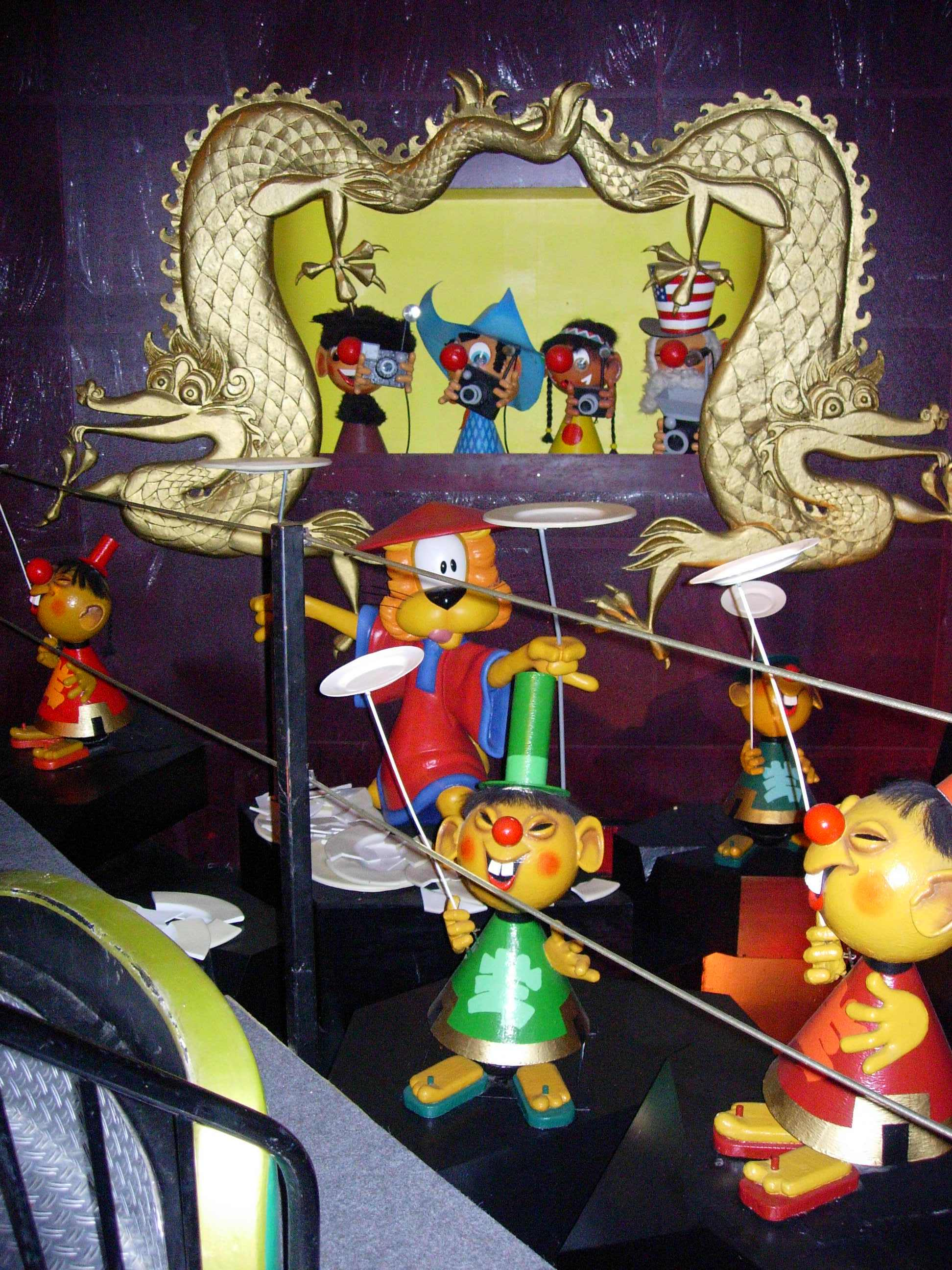 Loeki scène de la Chine Carnaval Festival